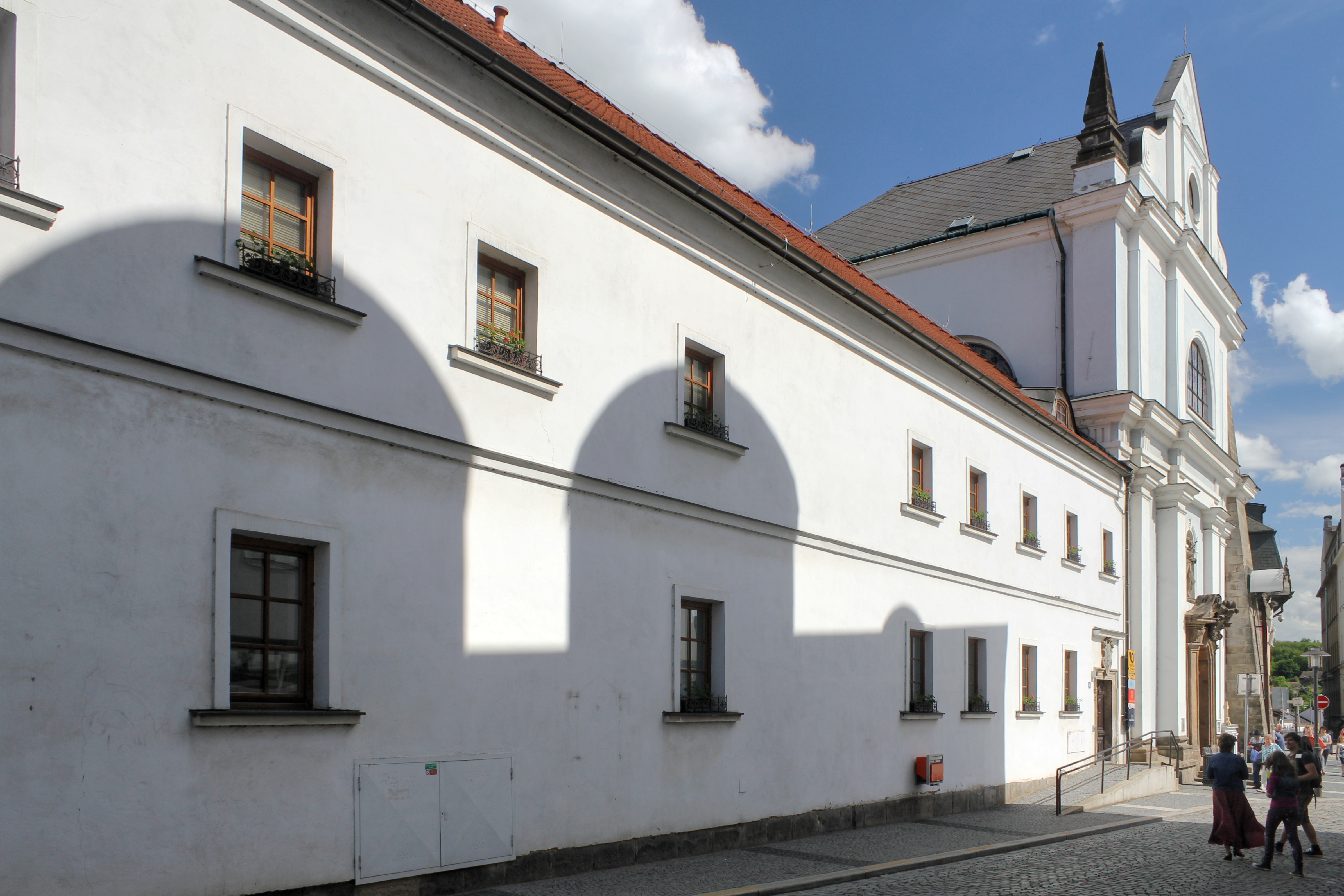 Pošta, bývalý františkánský klášter s kostelem sv. Františka z Assisi, náměstí Českého ráje čp.65, Turnov